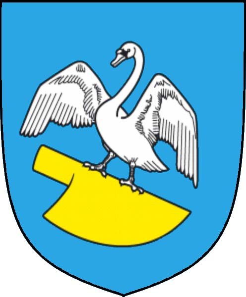 Znak obce Staré Heřminovy